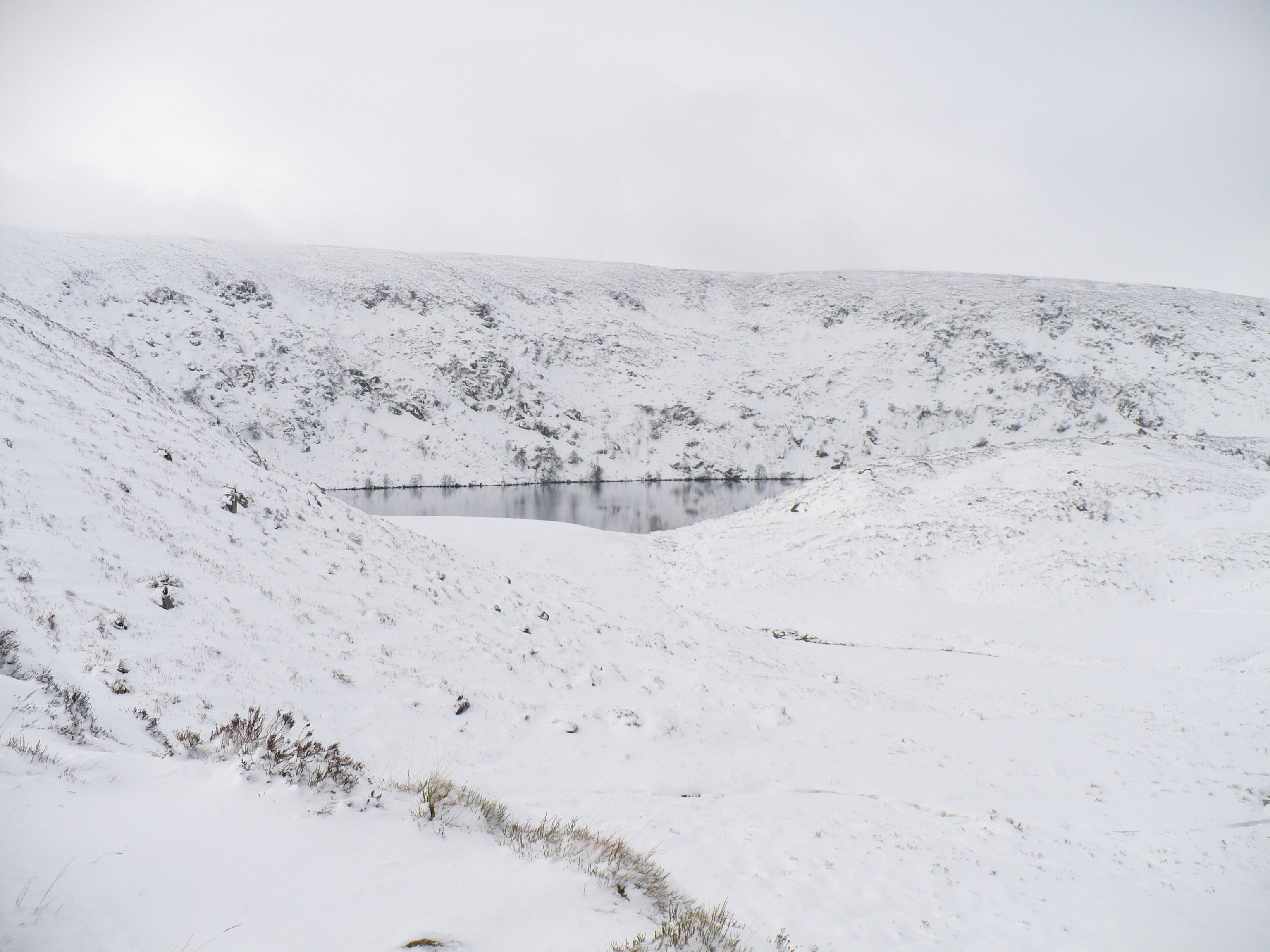 Lough Bray Upper, condado de Wicklow, Irlanda. Lough Bray Upper, Co. Wicklow, Ireland.